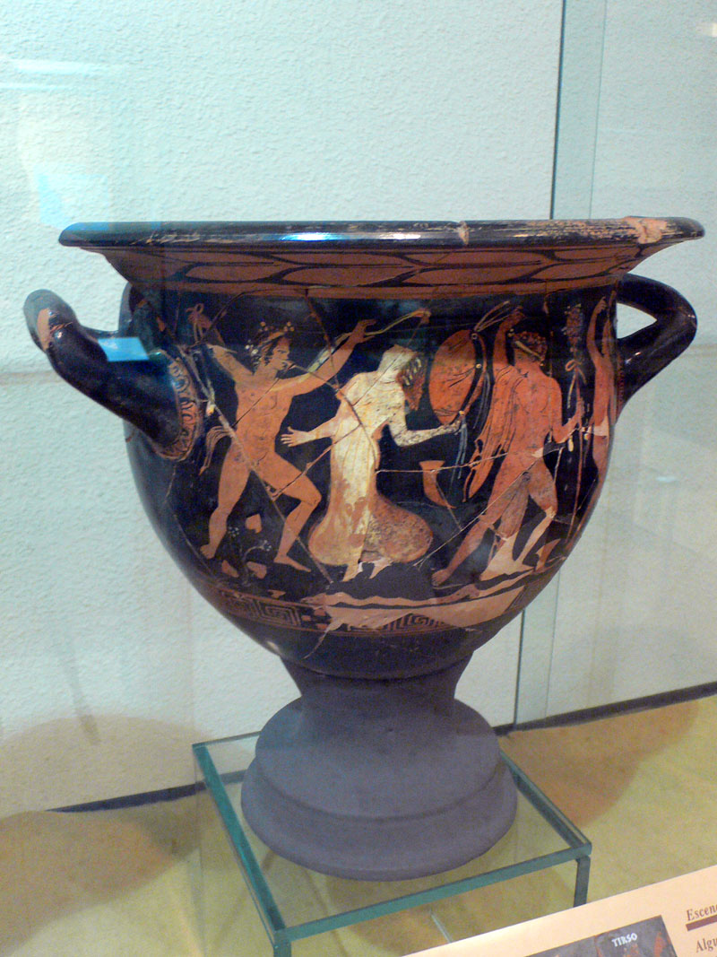 Crátera griega con escena del ciclo dionisíaco descubierta en la necrópolis ibérica de Los Nietos en Cartagena. Museo Arqueológico de Cartagena (España)